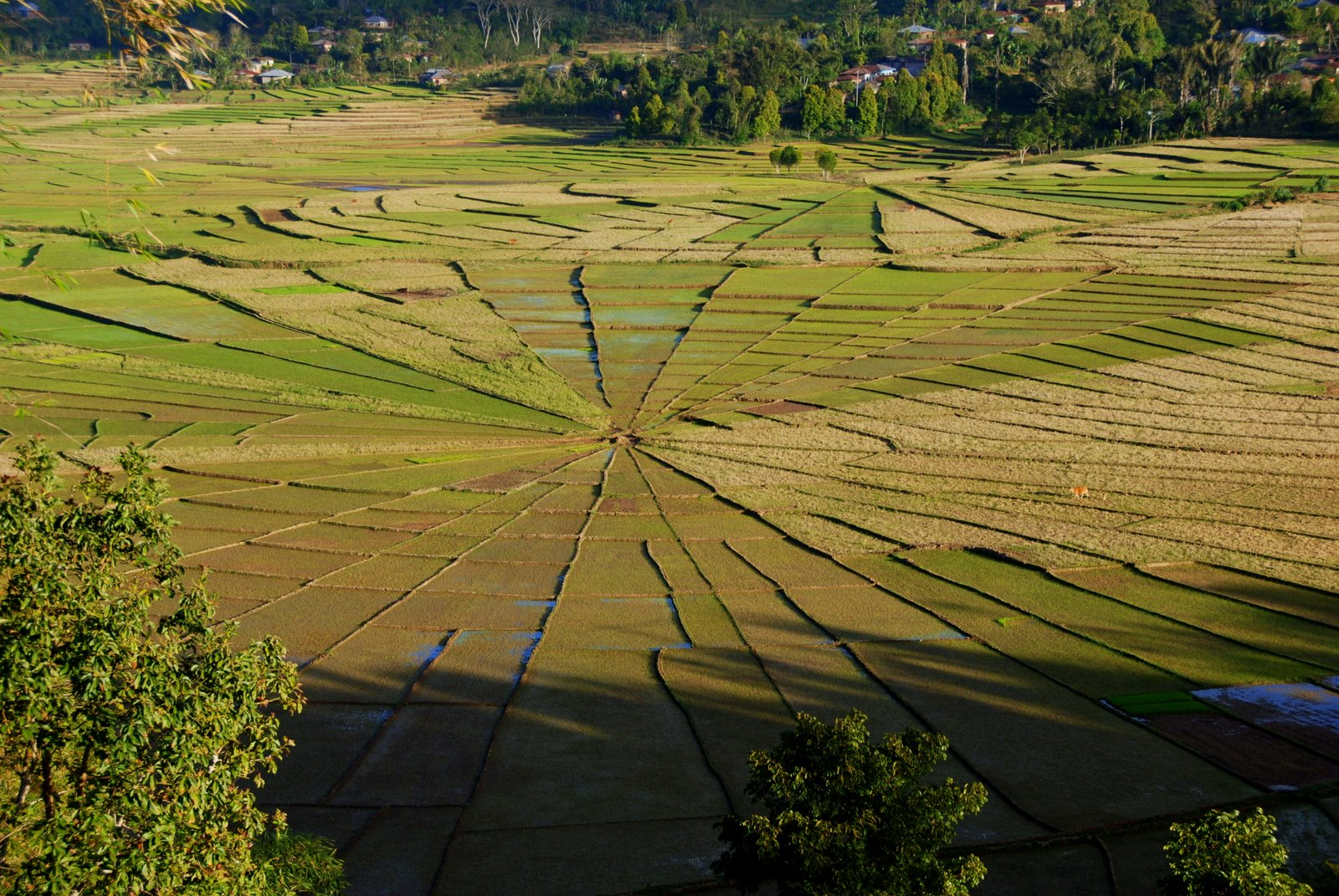 Wyspa Flores-Indonezja-pola ryżowe